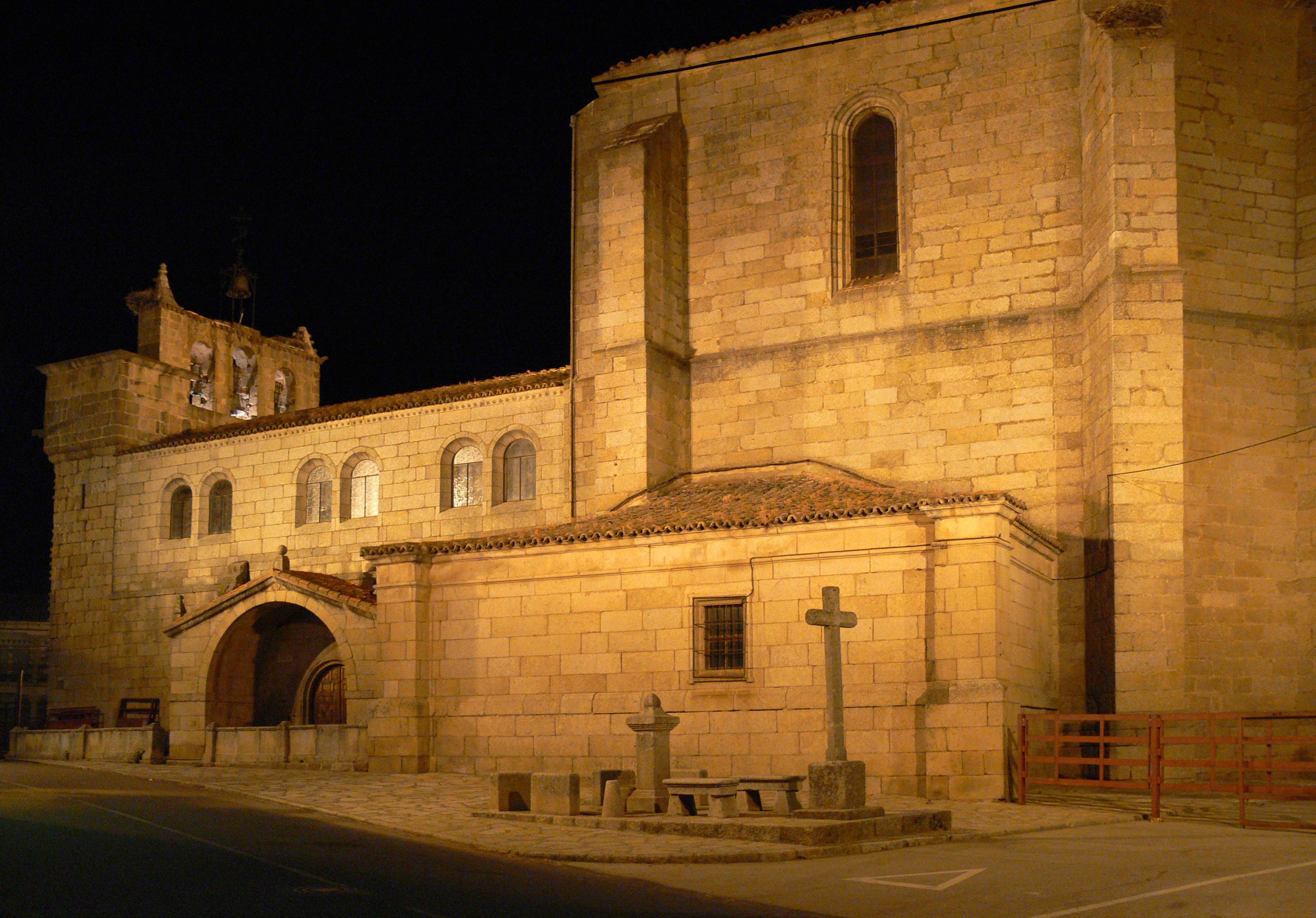 Iglesia de San Pedro Advíncula de Villavieja de Yeltes